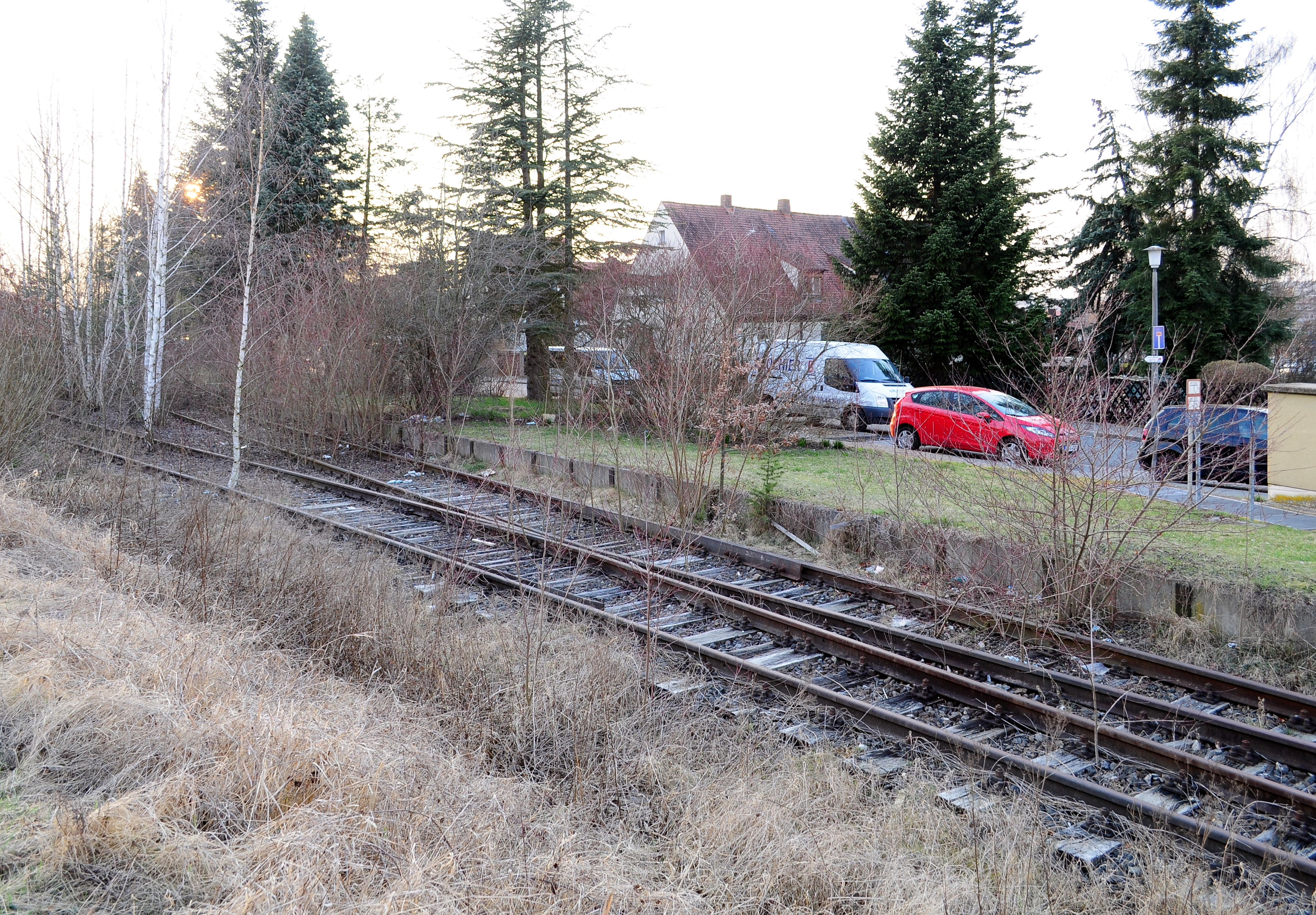 Bahnhof Zirndorf-Altenberg in Blickrichtung Nordwesten an der ehemaligen Bibertbahn